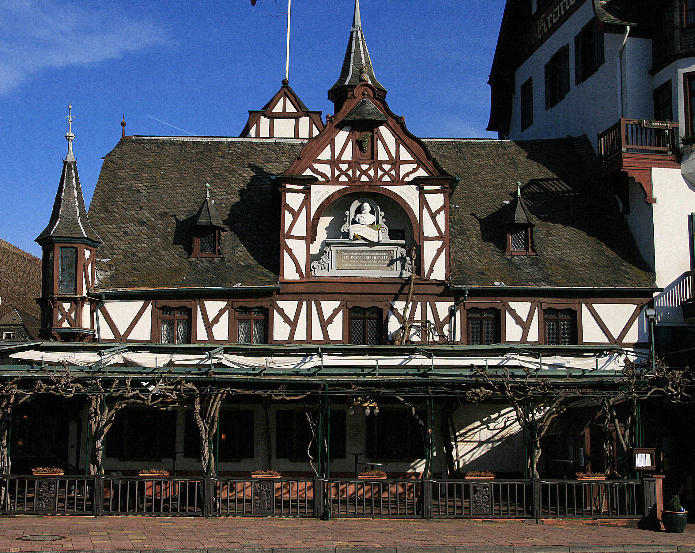 Hotel Krone, Assmannshausen, Rheingau-Taunus-Kreis. Gebäude der "alten" Krone mit Freiligrath-Büste. Hier ist auch das Freiligrath-Museum untergebracht.